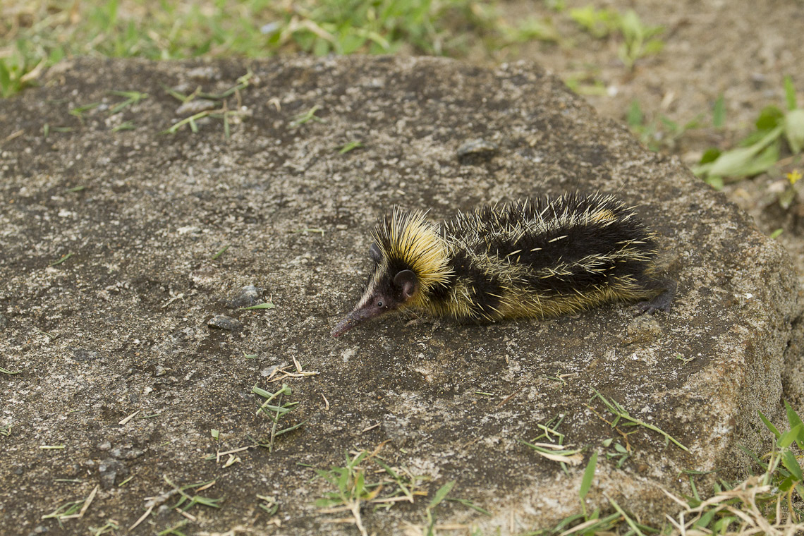 Tenrec - Masoala - Madagascar_MG_0633